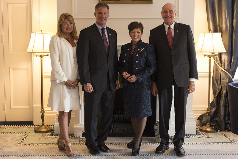 Scott Brown et la Gouverneur Générale de Nouvelle-Zélande, et leurs époux (juin 2017)